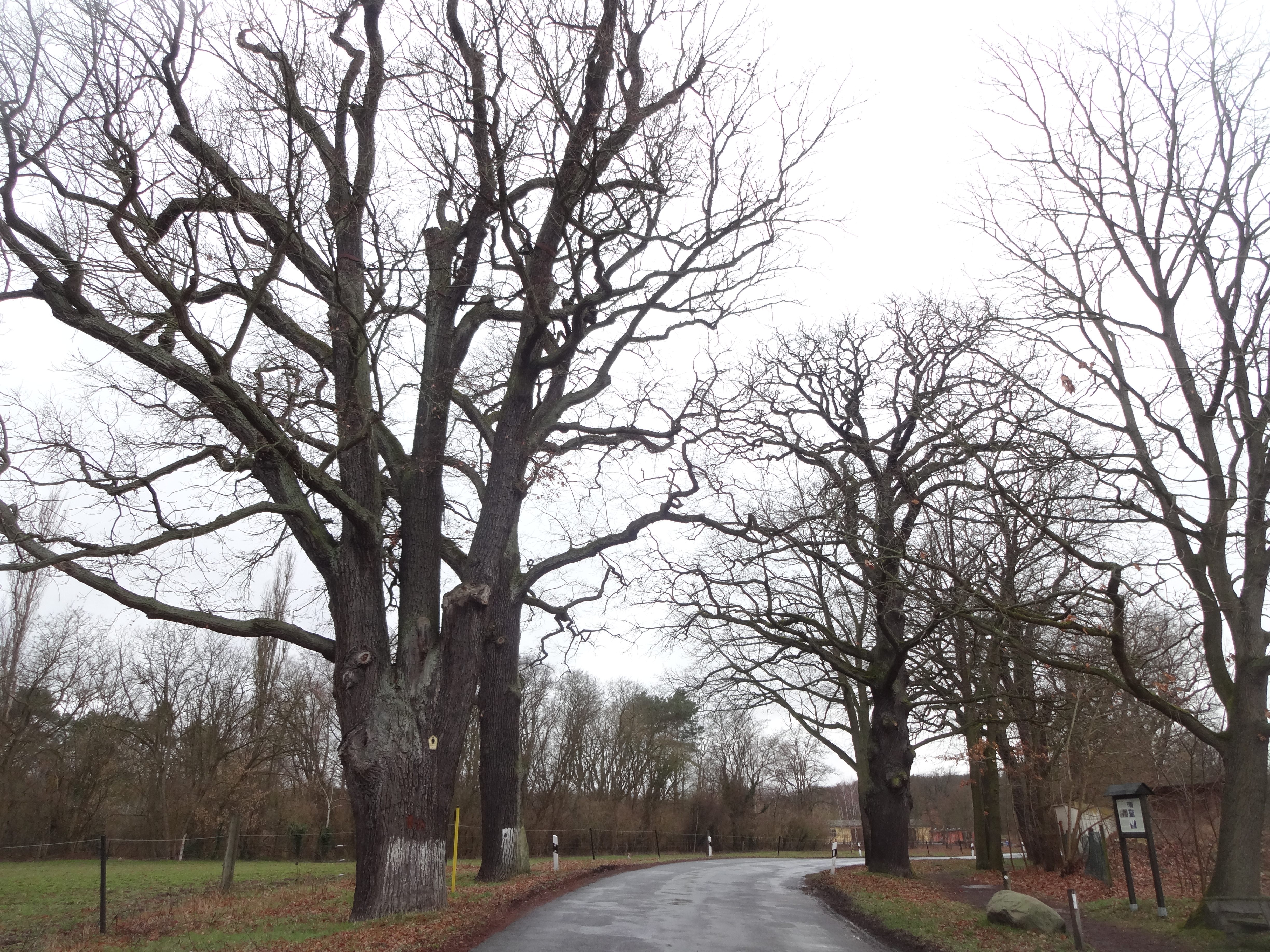 als Naturdenkmal geschützte Eichen-Allee in Rädel